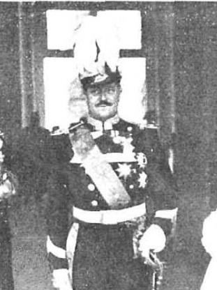 Bautizo de la hija primogénita de los marqueses de Santa Cruz, que fué apadrinada porlosReyes en este acto. La neófita, acompañada por la duquesa de San Carlos y por el marqués de Santa Cruz. (Fot. Goñi.)